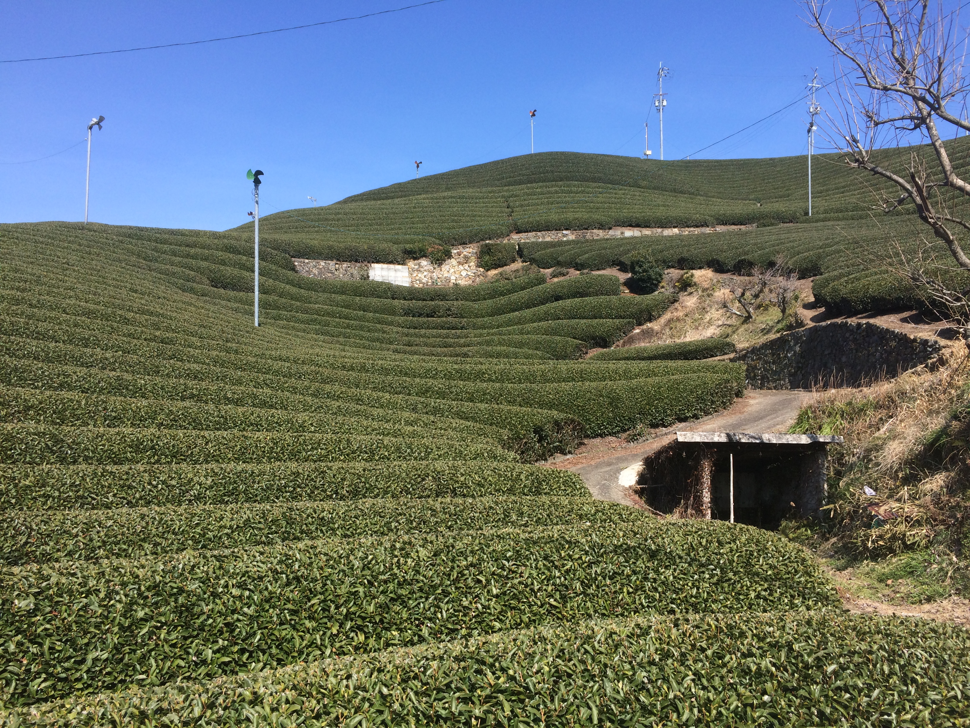 和束町の茶畑の風景